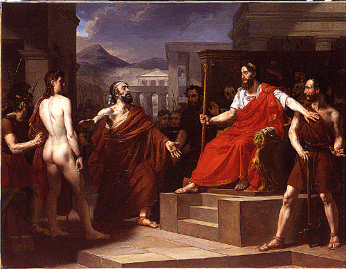 Pythias et Damon chez Denys le tyran, Ecole Nationale Supérieure des Beaux-Arts, Paris.